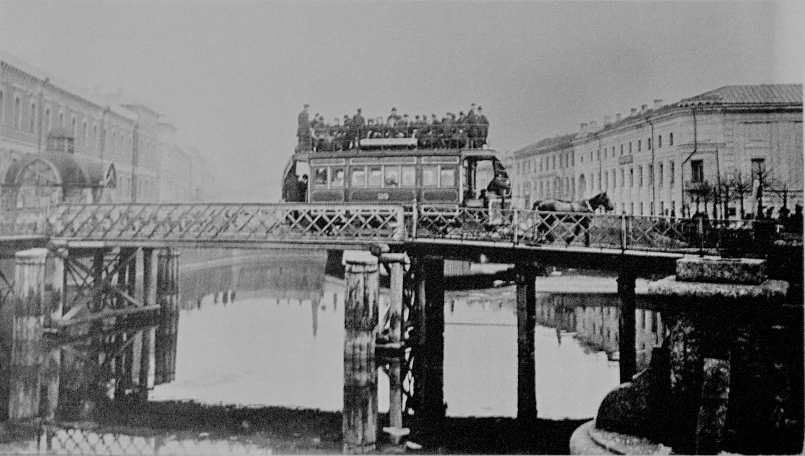 Старо-Коночный мост через Мойку в Санкт-Петербурге